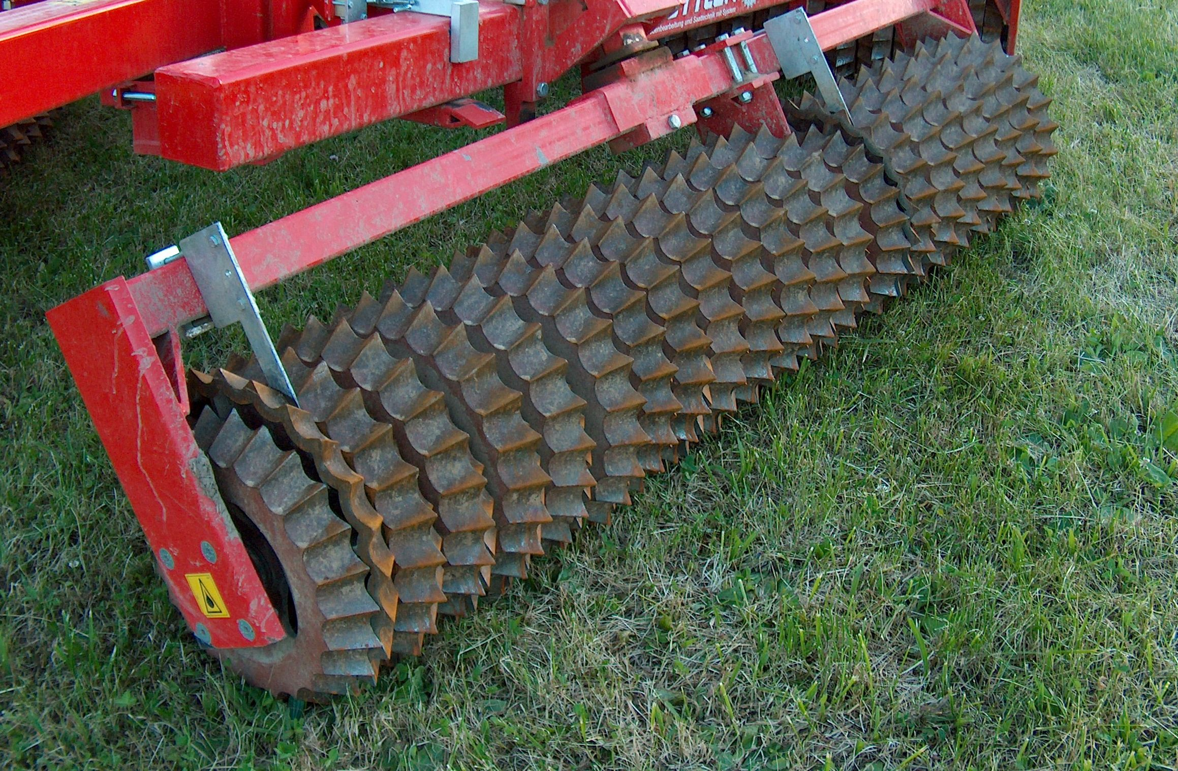 Detailansicht einer Prismenwalze